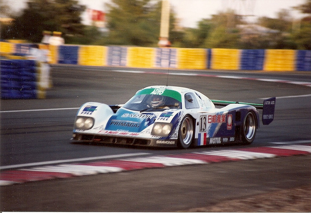 Courage C30LM n°13 aux 24 Heures du Mans 1993 à Mulsanne